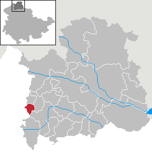 Gemeinde Kraja in Thüringen, Landkreis Nordhausen